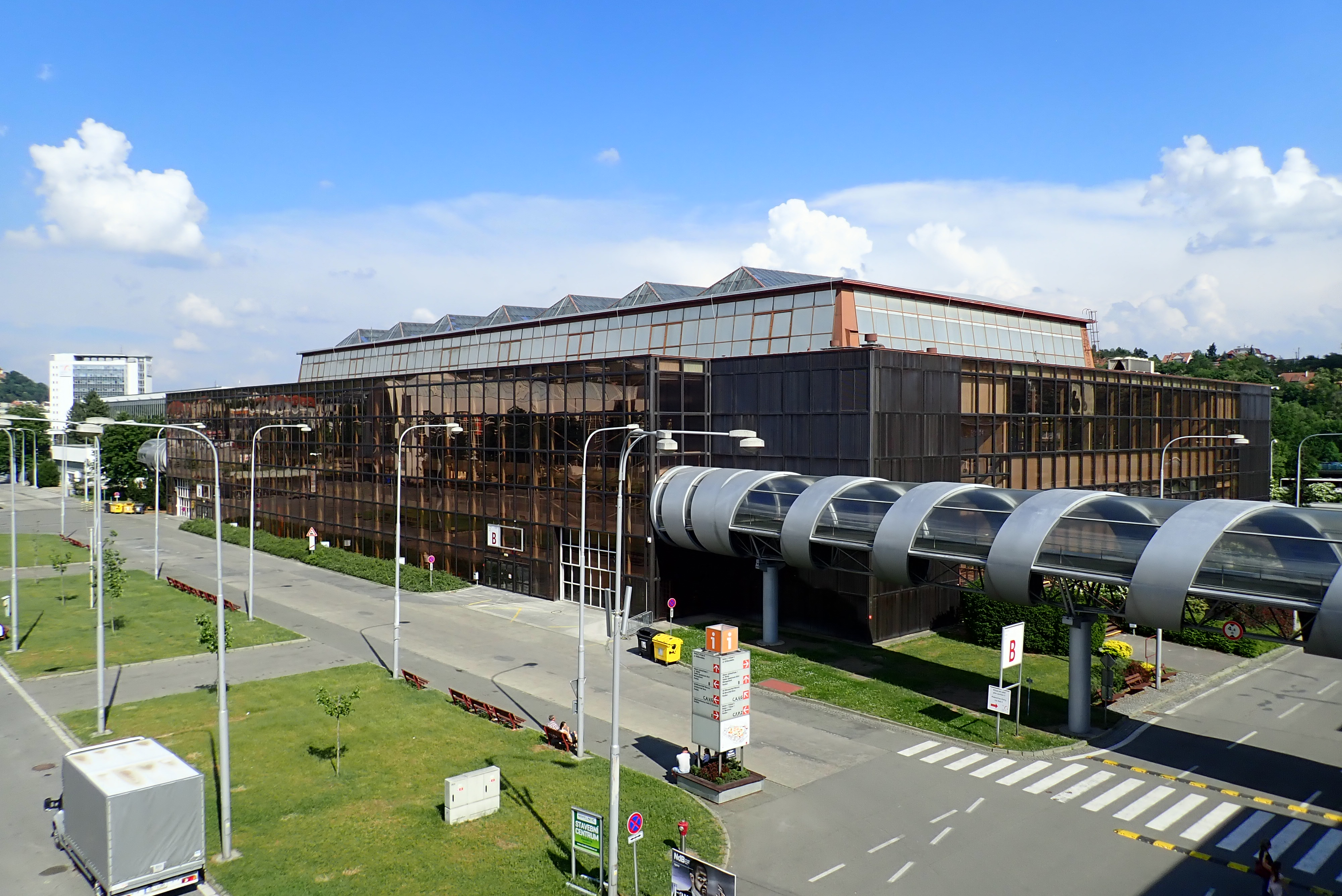 Pavilon B ze schodiště pavilonu E